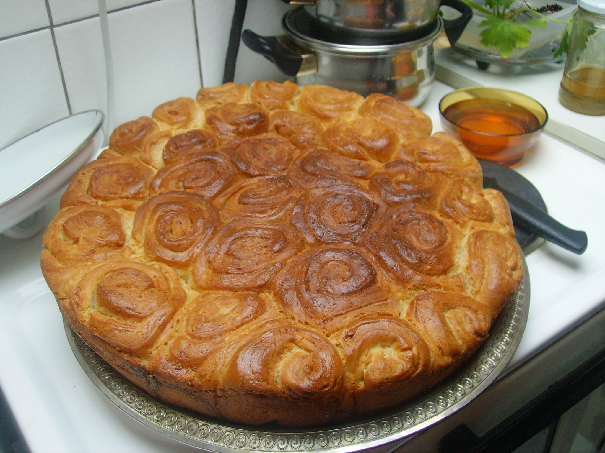 Топла сакарска месеница